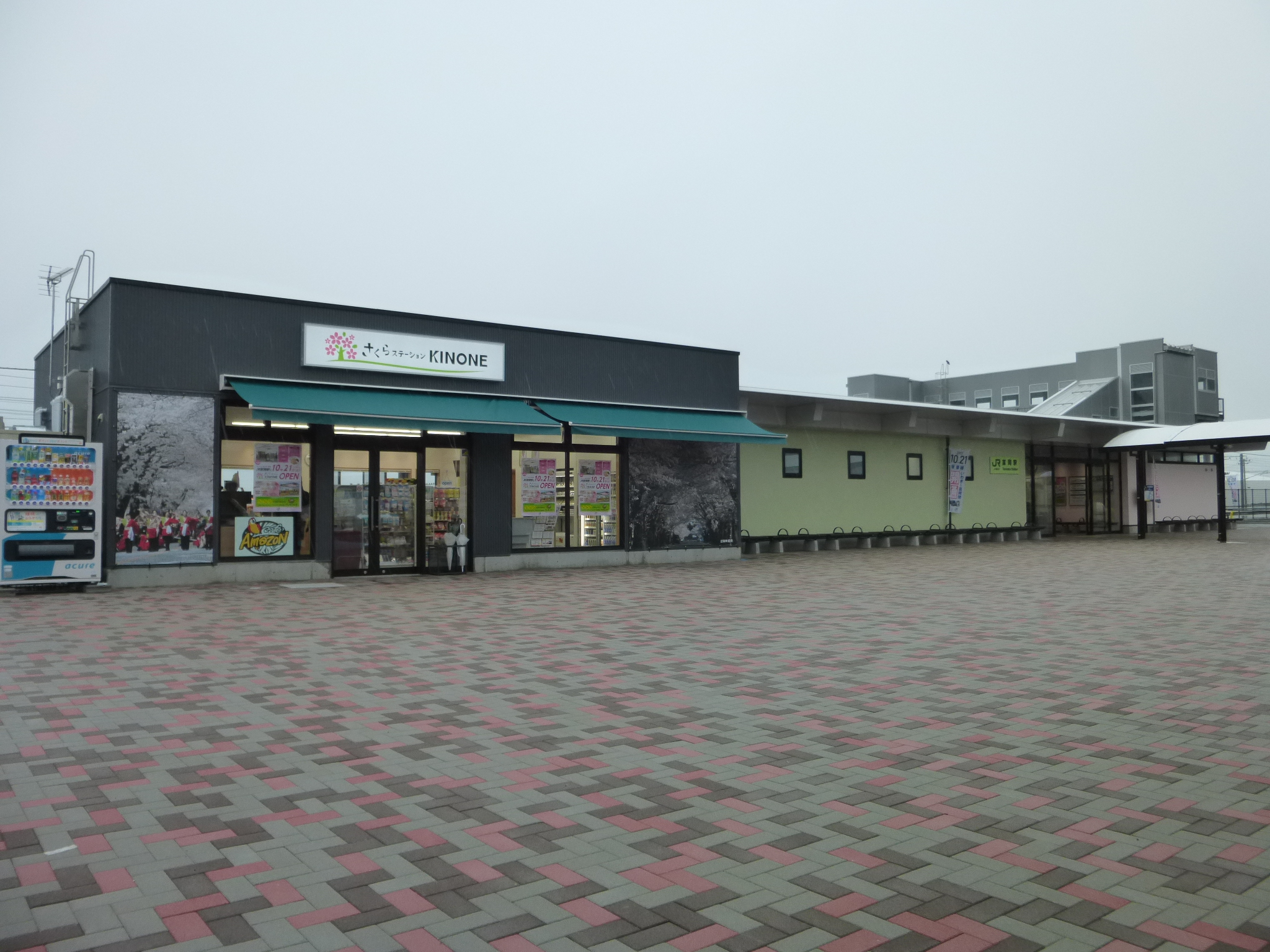 再建された富岡駅